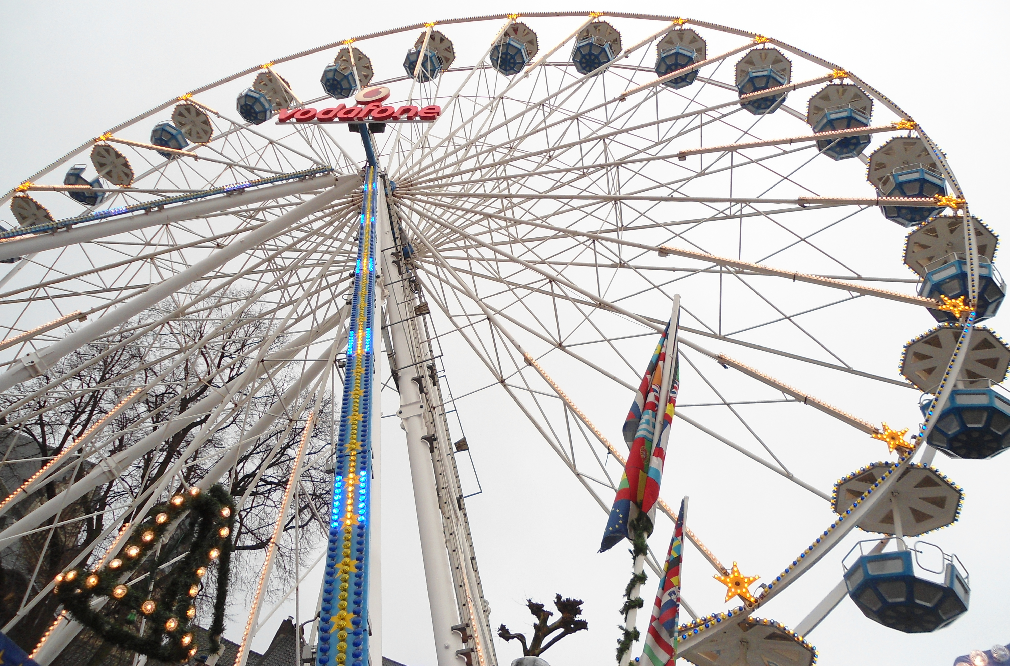 Reuzenrad